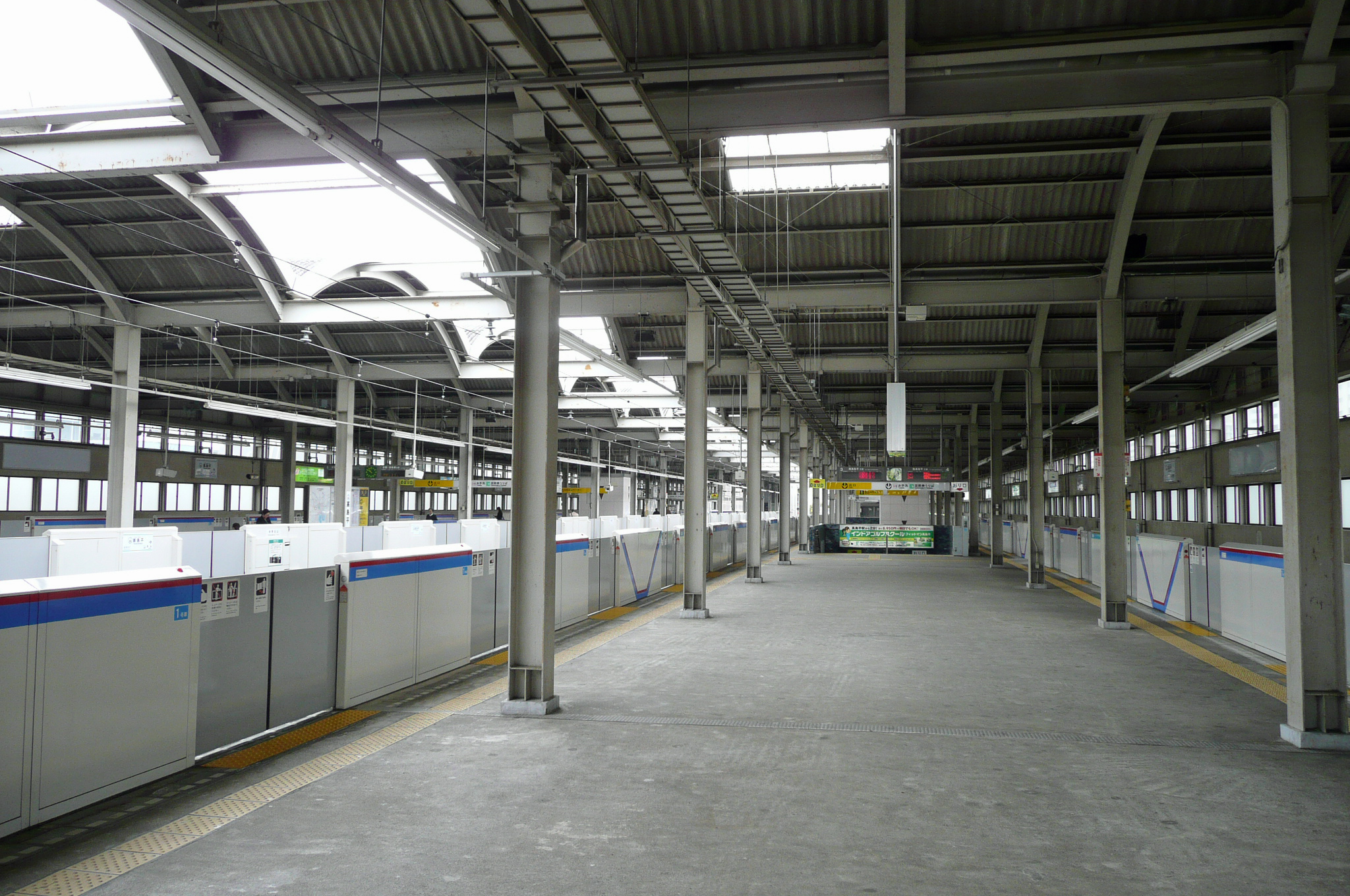 高島平駅ホーム（2007年撮影）